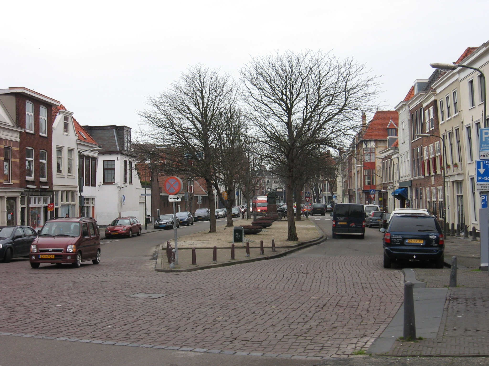 Den Haag